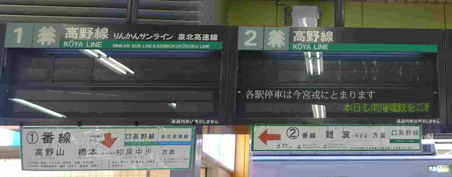 2017年までの南海電気鉄道新今宮駅の案内表示機。行先を反転フラップ式で、停車駅をLED式で表示。高野線極楽橋方面には「りんかんサンライン」の表示が残存。2018年現在はLCD式に交換済